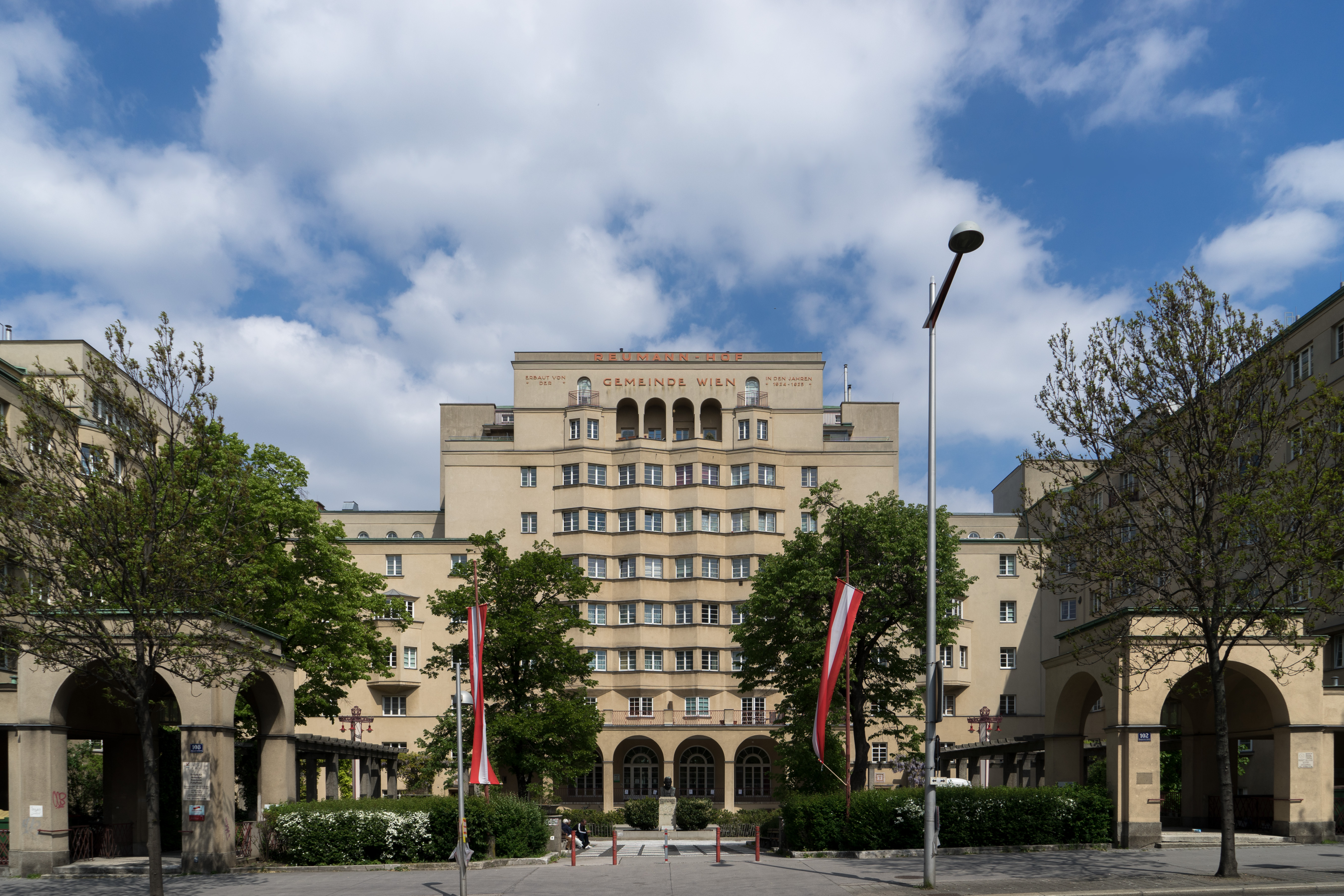 Der Reumannhof in Wien Margareten ist mit eigenem Brunnen eine der schönsten Gemeindebauten der Zwischenkriegszeit. Er ist am Gürtel, dem sogenannten "Ring des Proletariats" gelegen. This media shows the Vienna residential building (Gemeindebau) with the ID 93. Object location48° 10′ 57.41″ N, 16° 20′ 52.45″ E